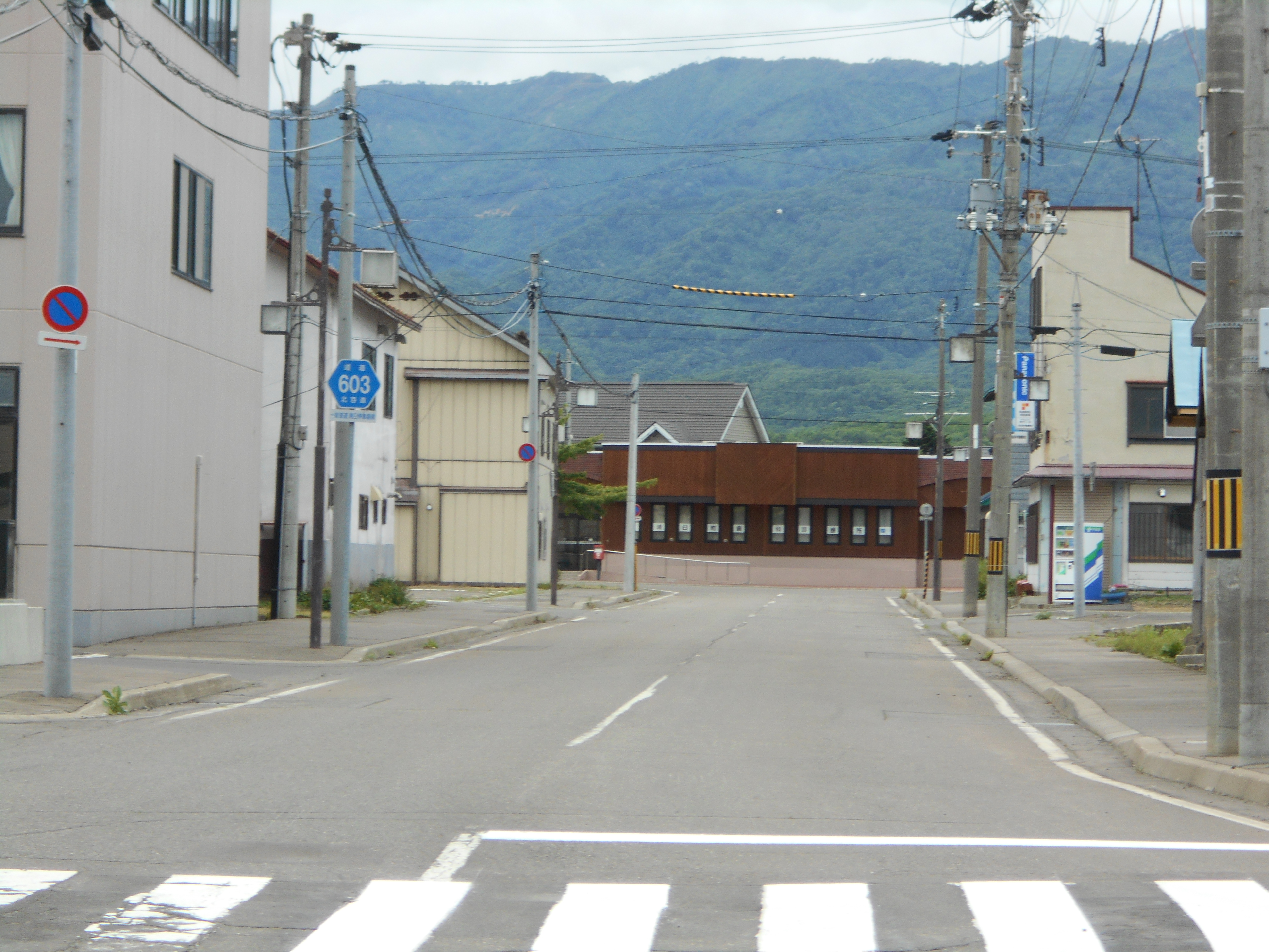 北海道道603号浦臼停車場線